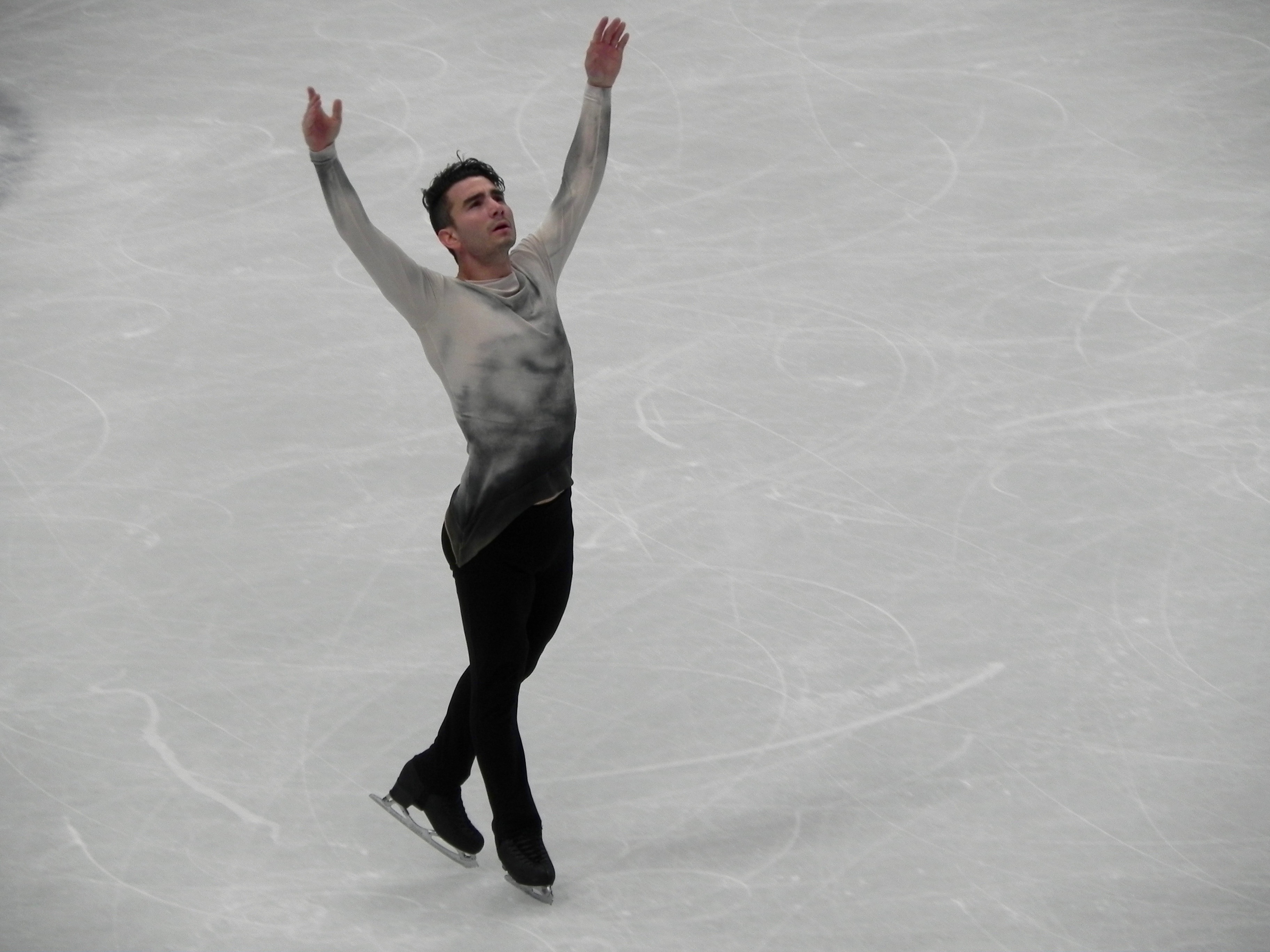 Max Aaron ai campionati mondiali di pattinaggio di figura di Milano 2018.